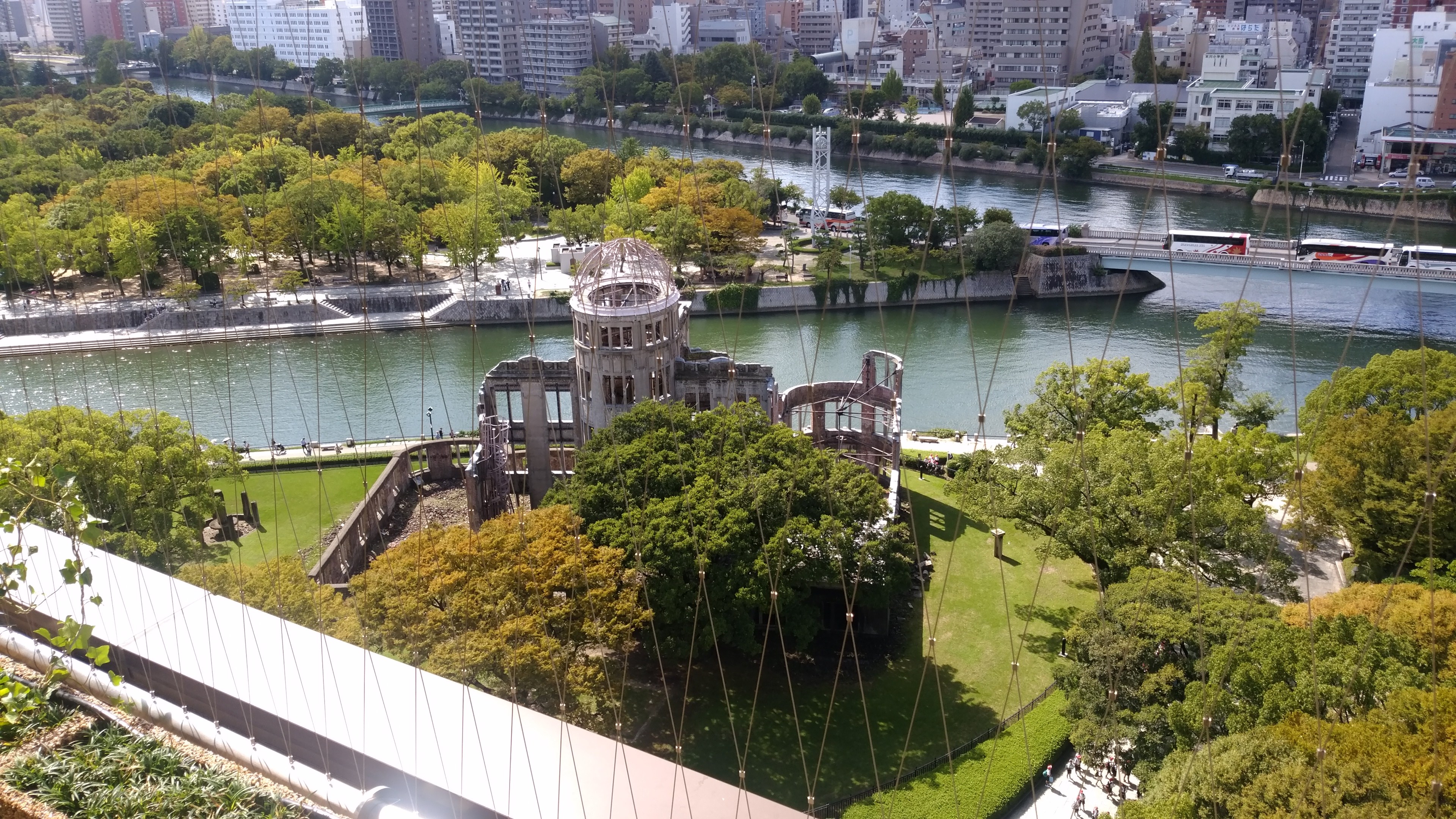 広島平和記念公園